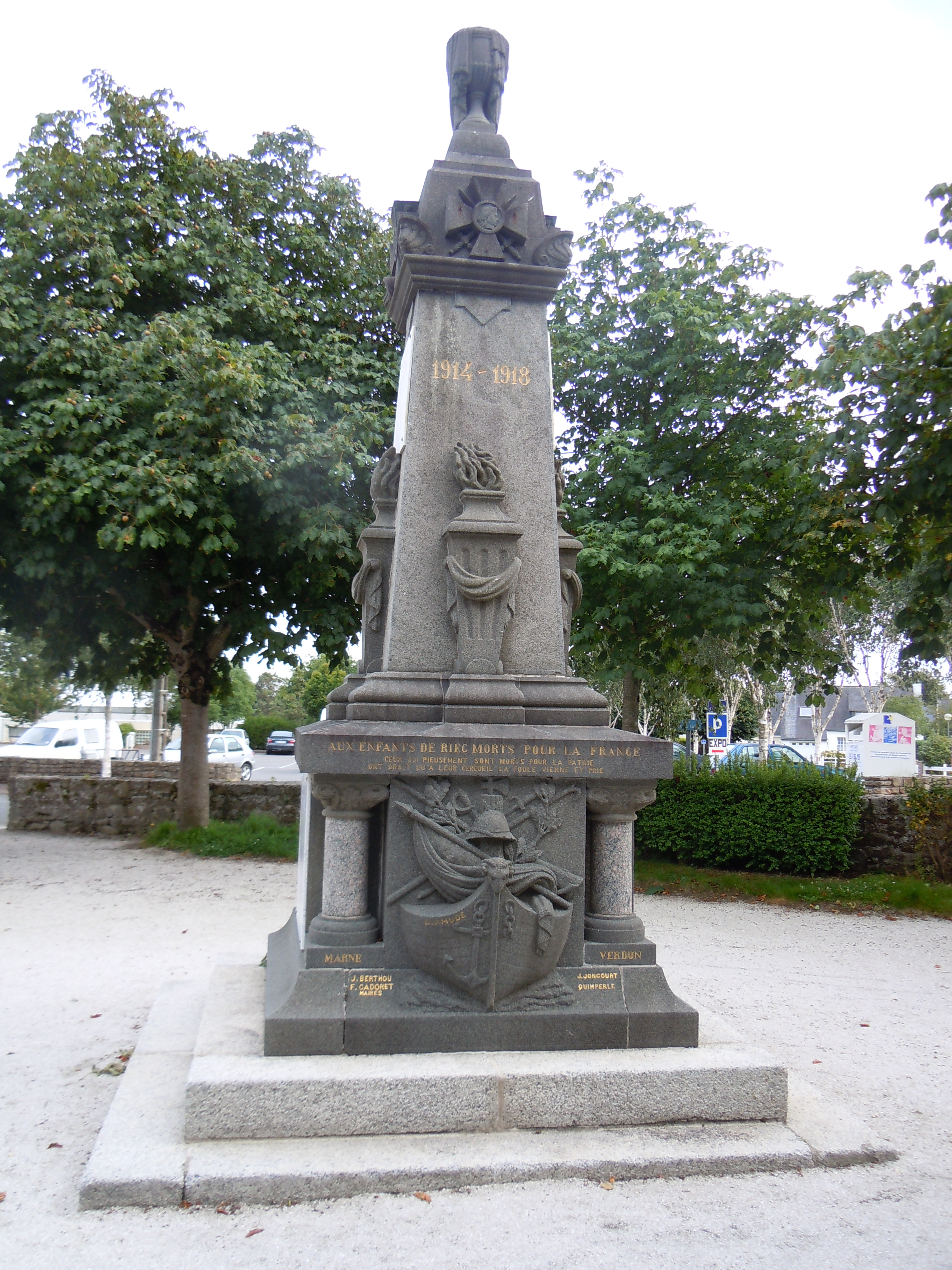 monument aux morts de la commune de Riec-sur-Belon, département du Finistère, France